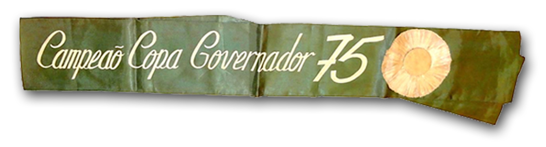 Faixa de Campeão da Copa Governador de 1975 recebida pelos membros do Esporte Clube Juventude. Exemplar pertencente a Vitor Augusto Longhi, preparador físico do time vencedor.